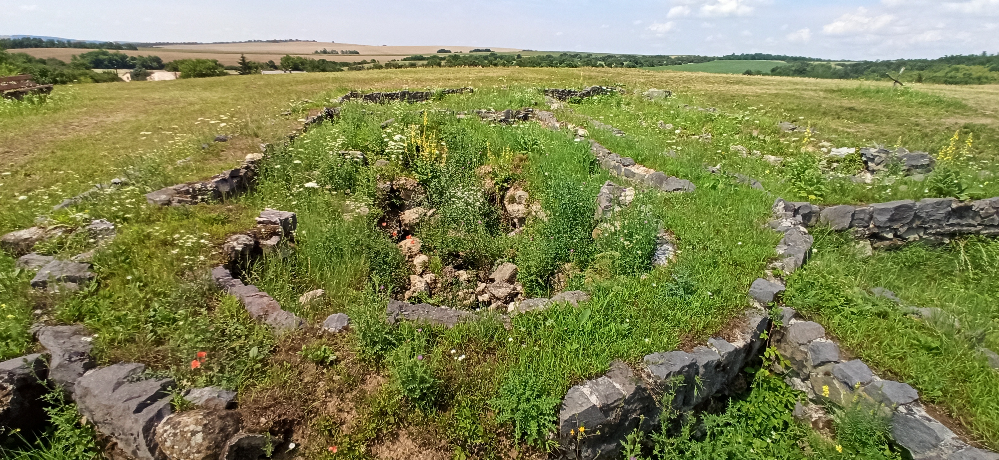 Szent Mihály templom romjai Patkóspusztán (Teszér része)